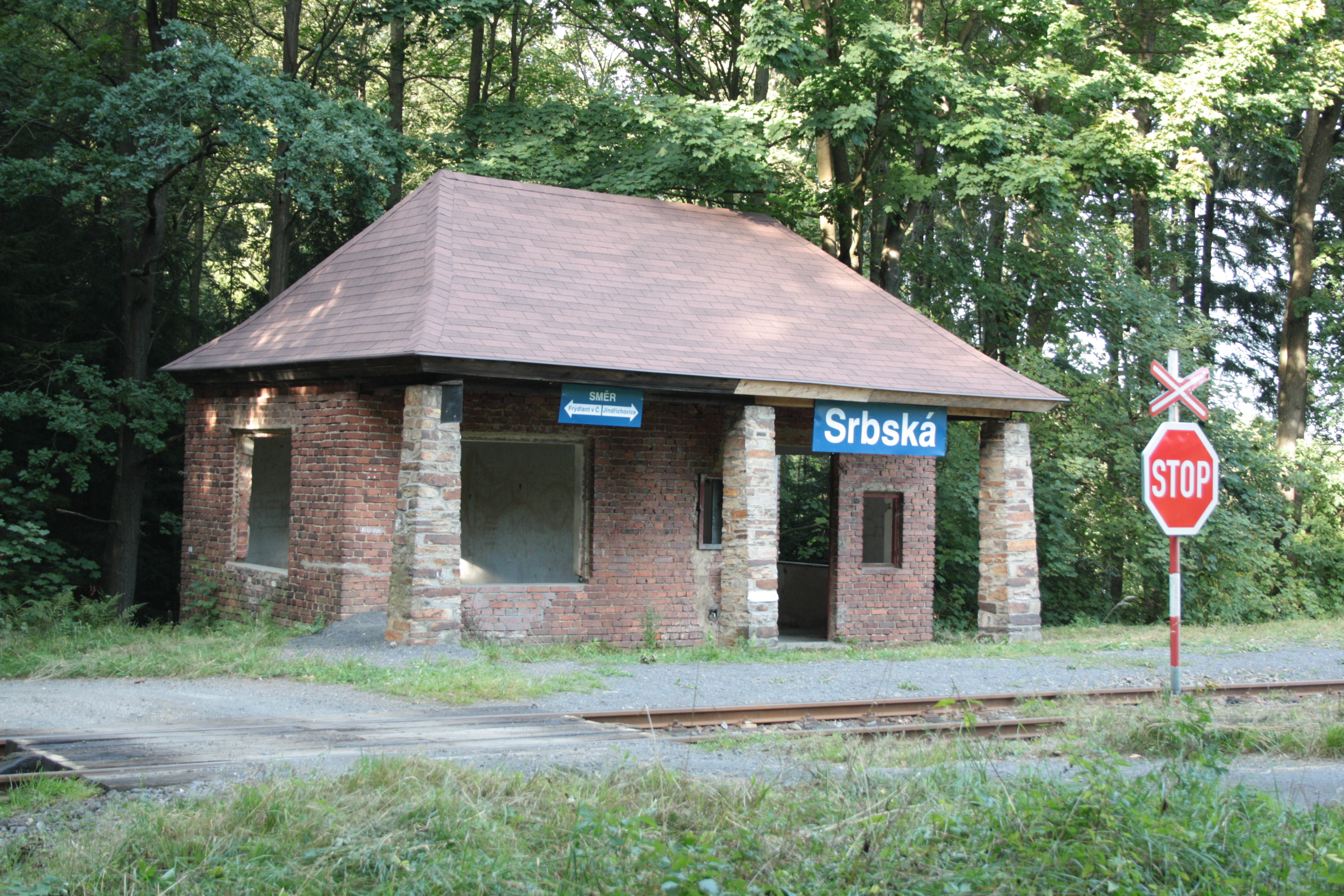 This photograph was taken with a DSLR from WMCZ's Camera grant. Pohled od jihozápadu na čekárnu v železniční zastávce Srbská.